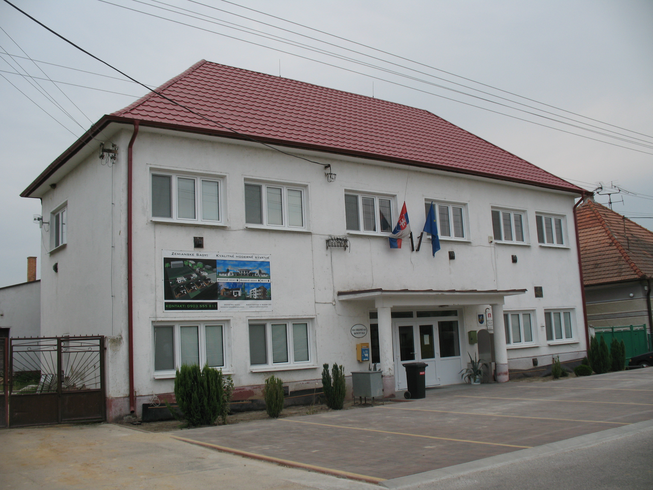 Nemeskürt